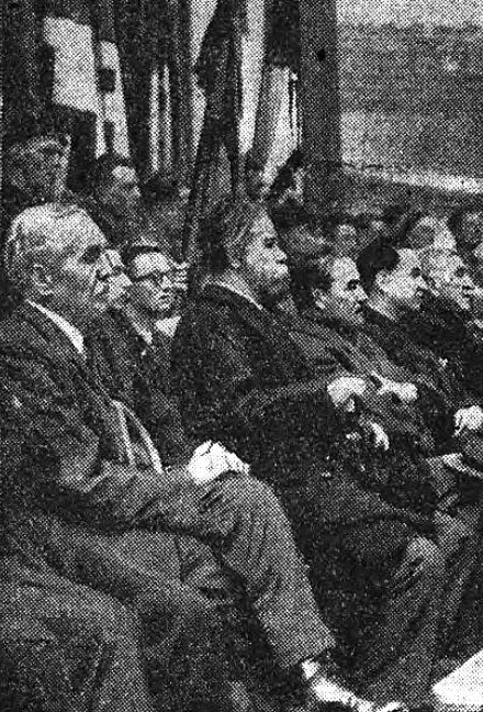 Meeting du Front révolutionnaire national au Vél'd'Hiv le 11 avril 1943. "Un aspect de la tribune où l'on reconnaît, de gauche à droite, MM. Georges Claude, de Châteaubriant, Marcel Déat, Bucard, Paul Chack". Non visibles sur cette photographie mais également présents : Henri Barbé, Francis Desphelippon, Lucien Rebatet, Dr. André Rainsart, Georges Soulès, Kléber Legay.